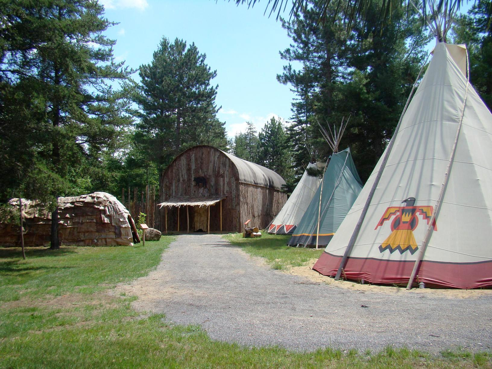 Site amérindien Mokotakan